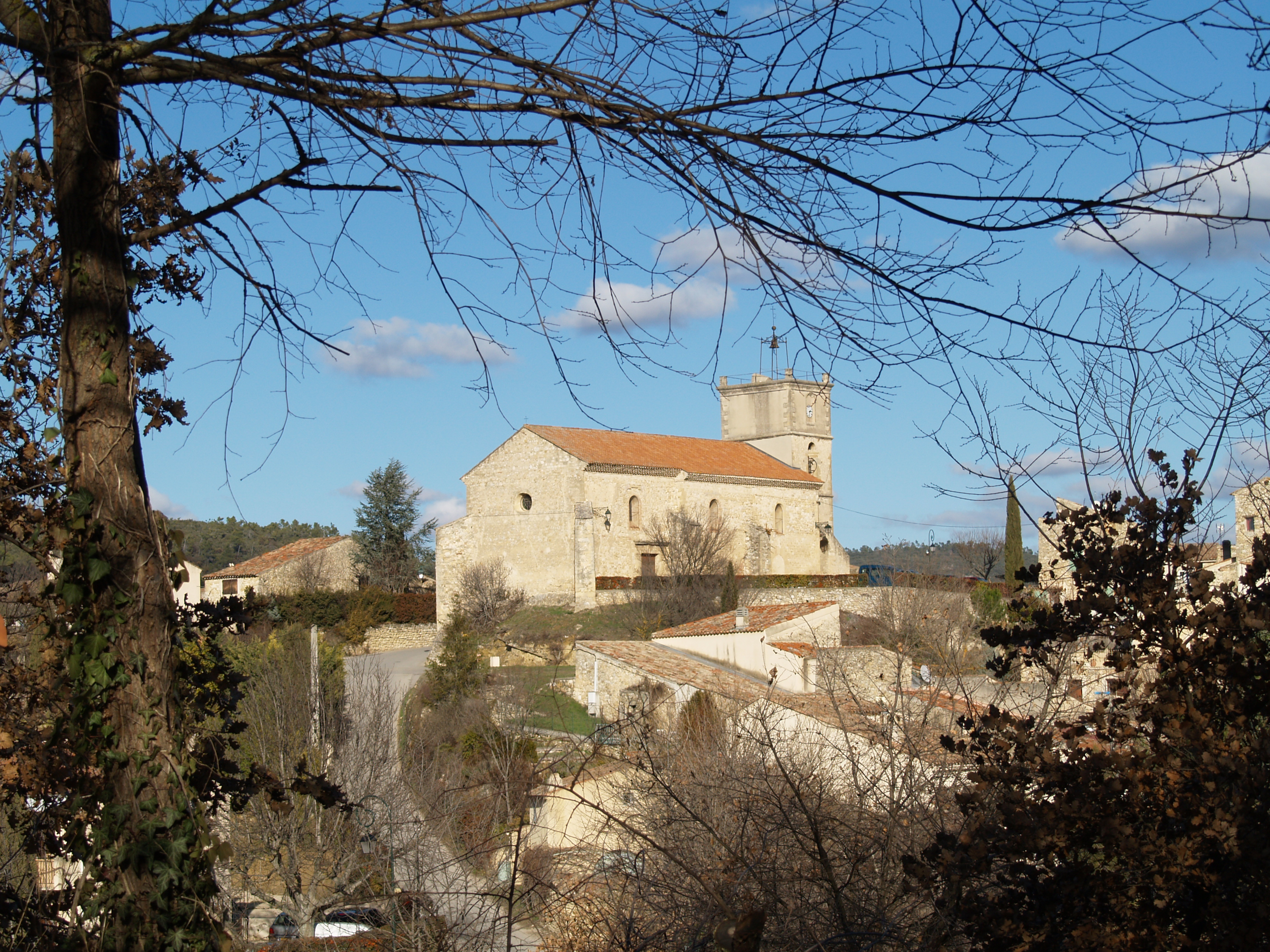 Eglise paroissiale Saint-Pierre - Mirabeau